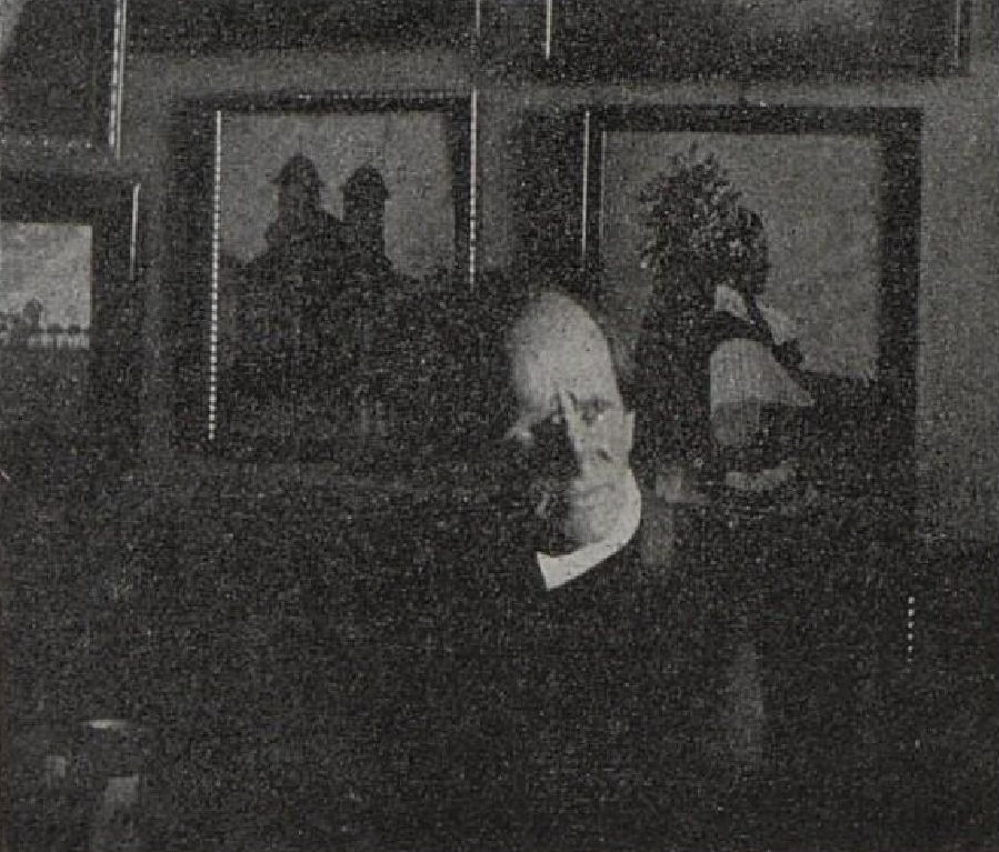 Klír František Josef (1867-1941), český výtvarník, malíř, portrétista a krajinář.